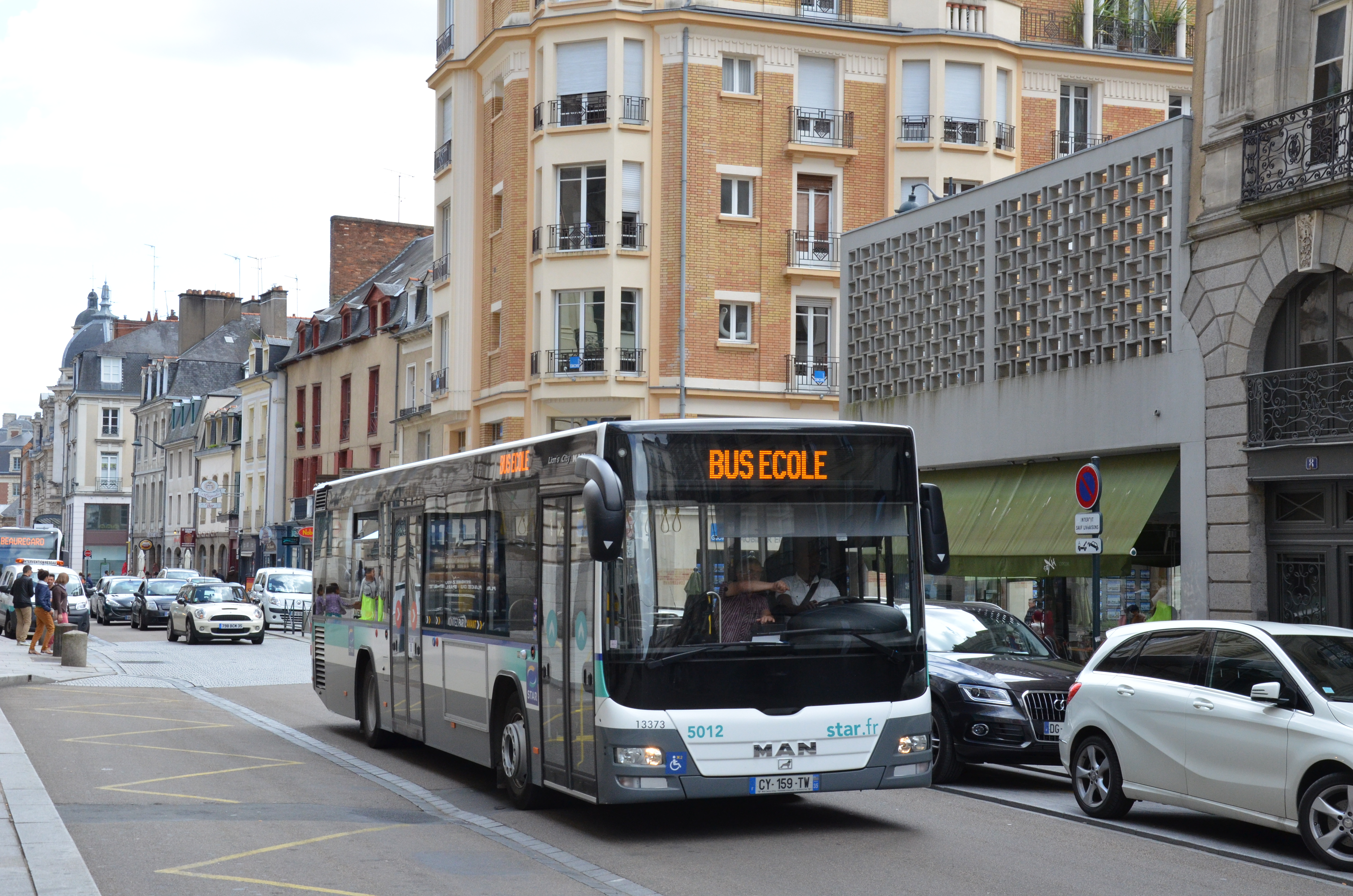 MAN Lion's City n°5012 du réseau STAR de Rennes, près de l'arrêt République.